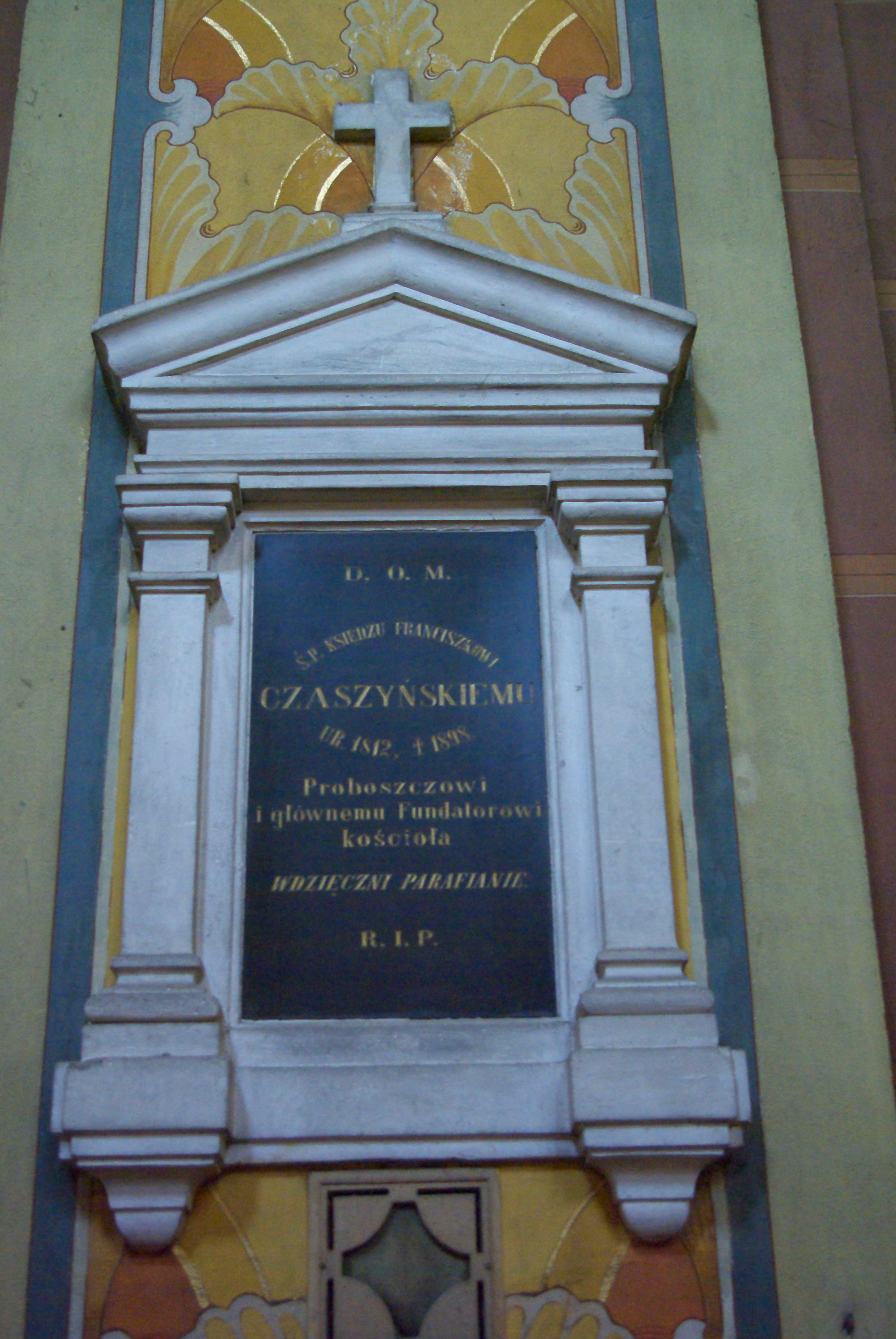 Epitafium ks. Franciszka Salezego Czaszyńskiego w kościele Przemienienia Pańskiego w Sanoku